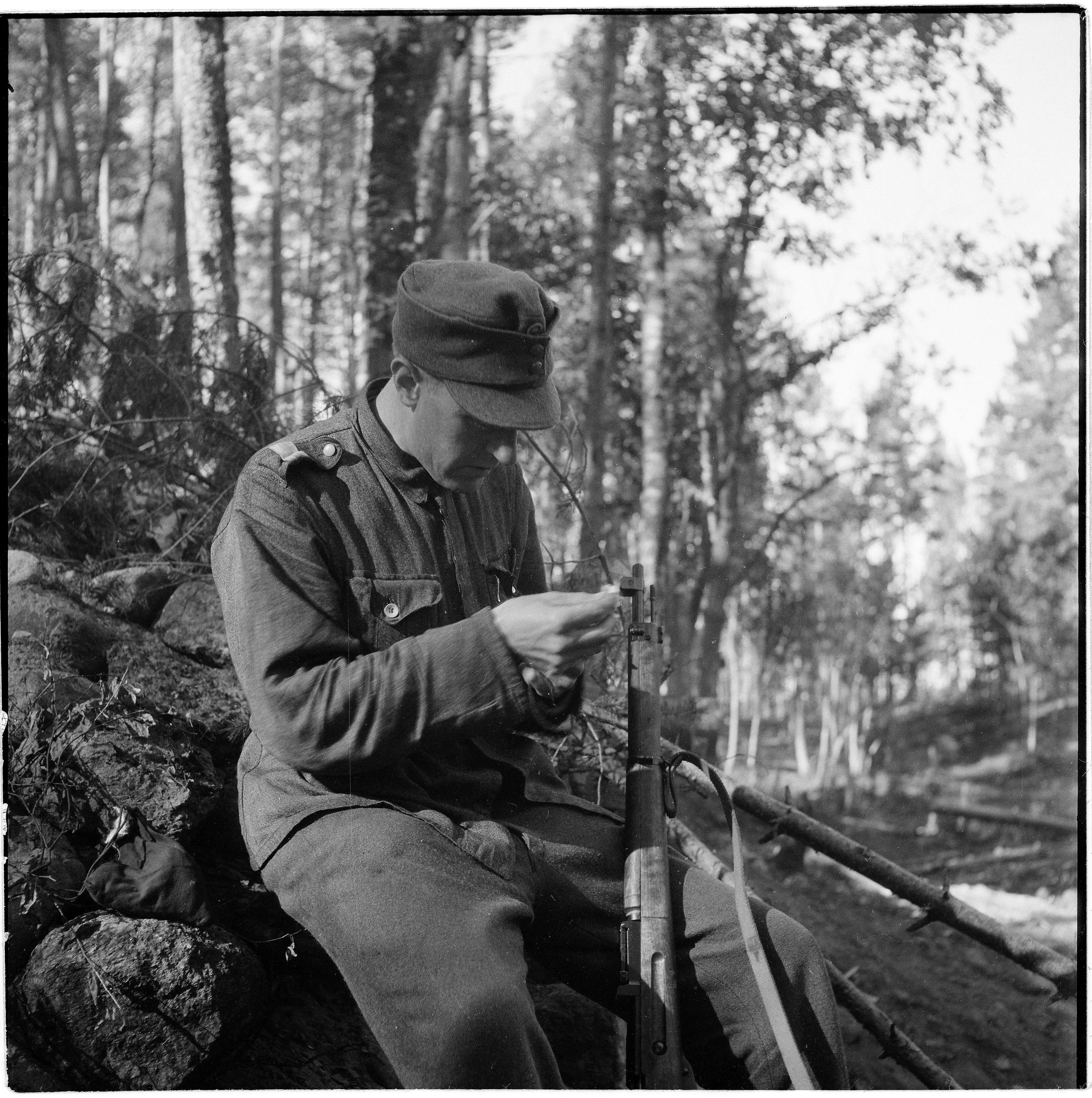 Juoksija Harry Larva puhdistaa kivääriänsä. SA-kuvat